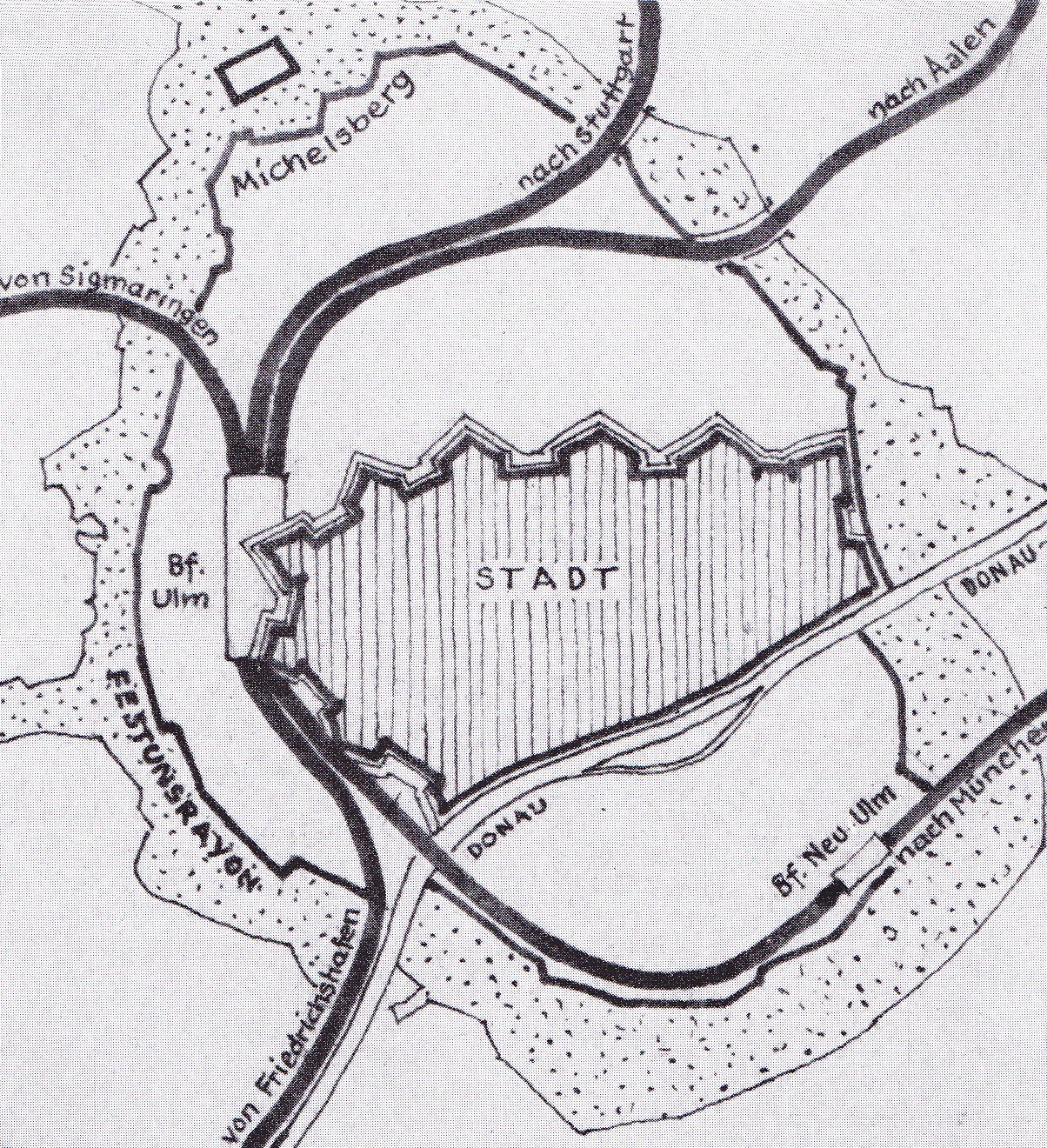 Karte der Eisenbahnstrecken und Bahnhöfe in Ulm und Neu-Ulm Ende des 19. Jahrhunderts